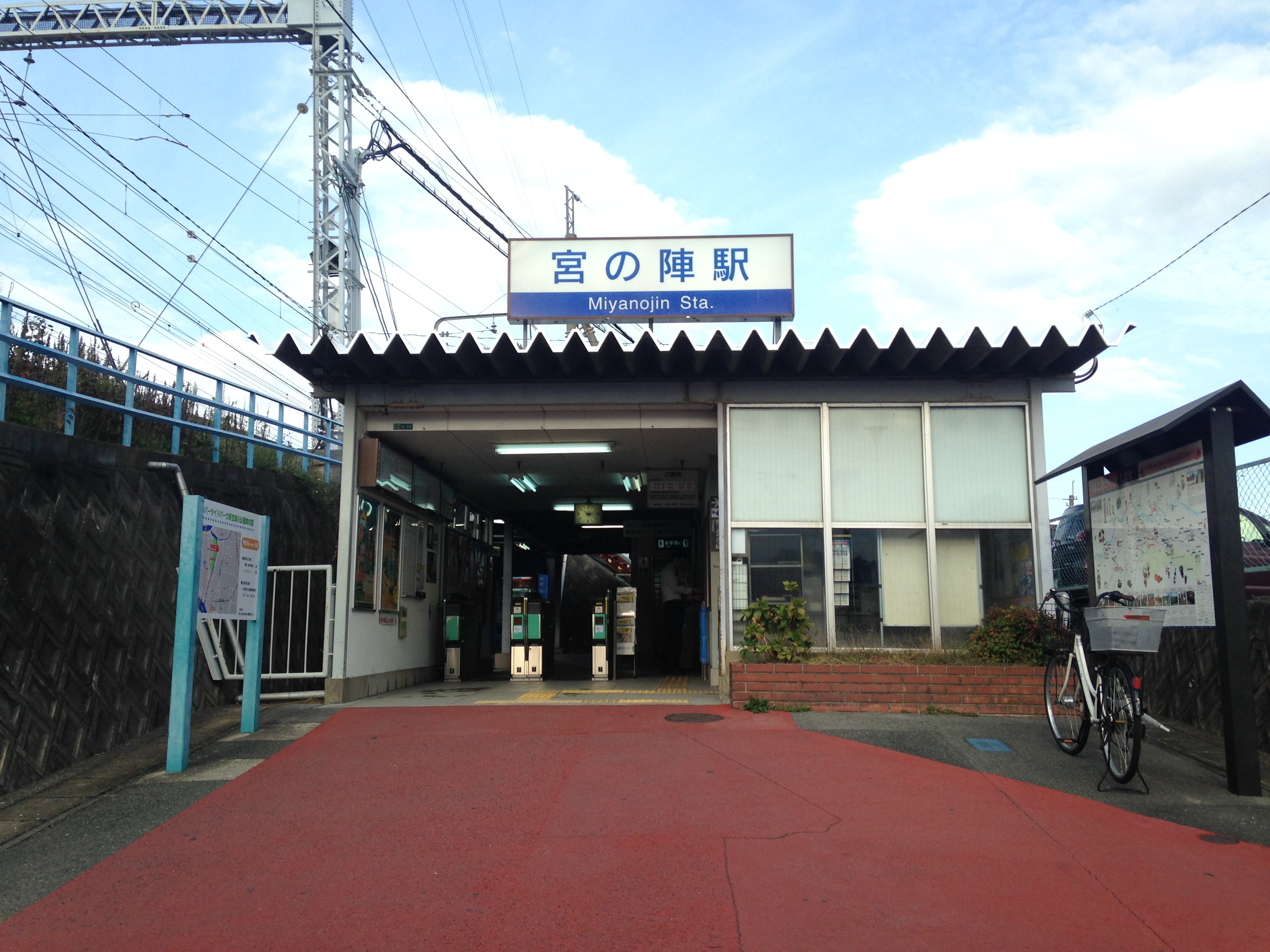 宮の陣駅駅舎